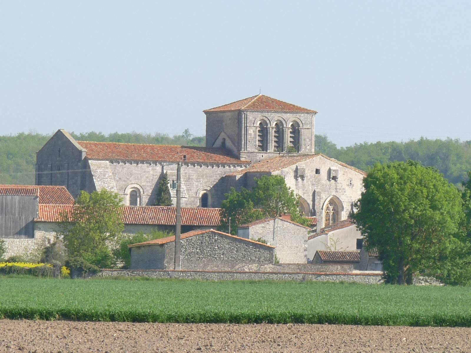 Prieuré de Lanville, Charente, France